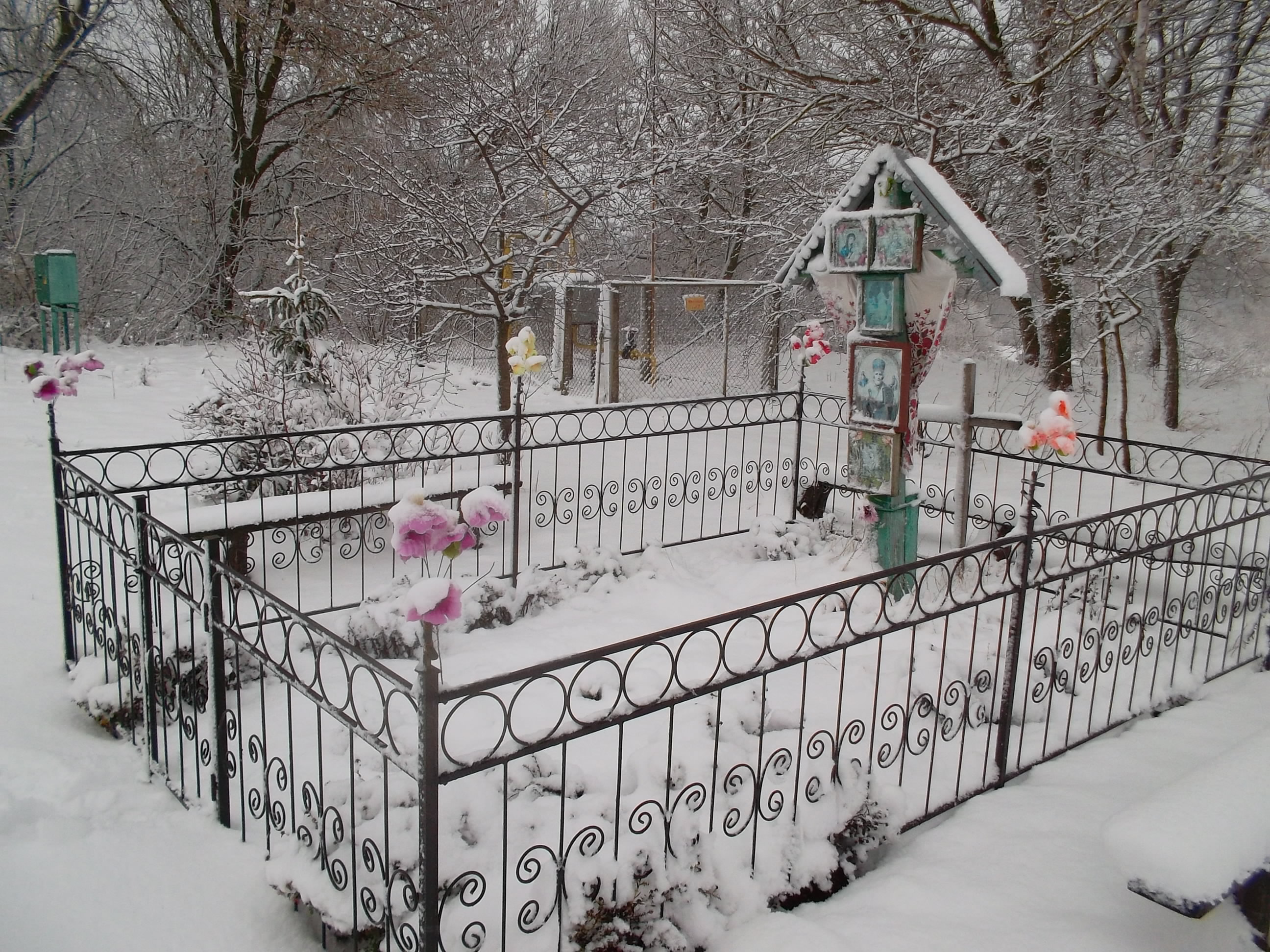 Пам'ятний хрест на місці зруйнованої церкви